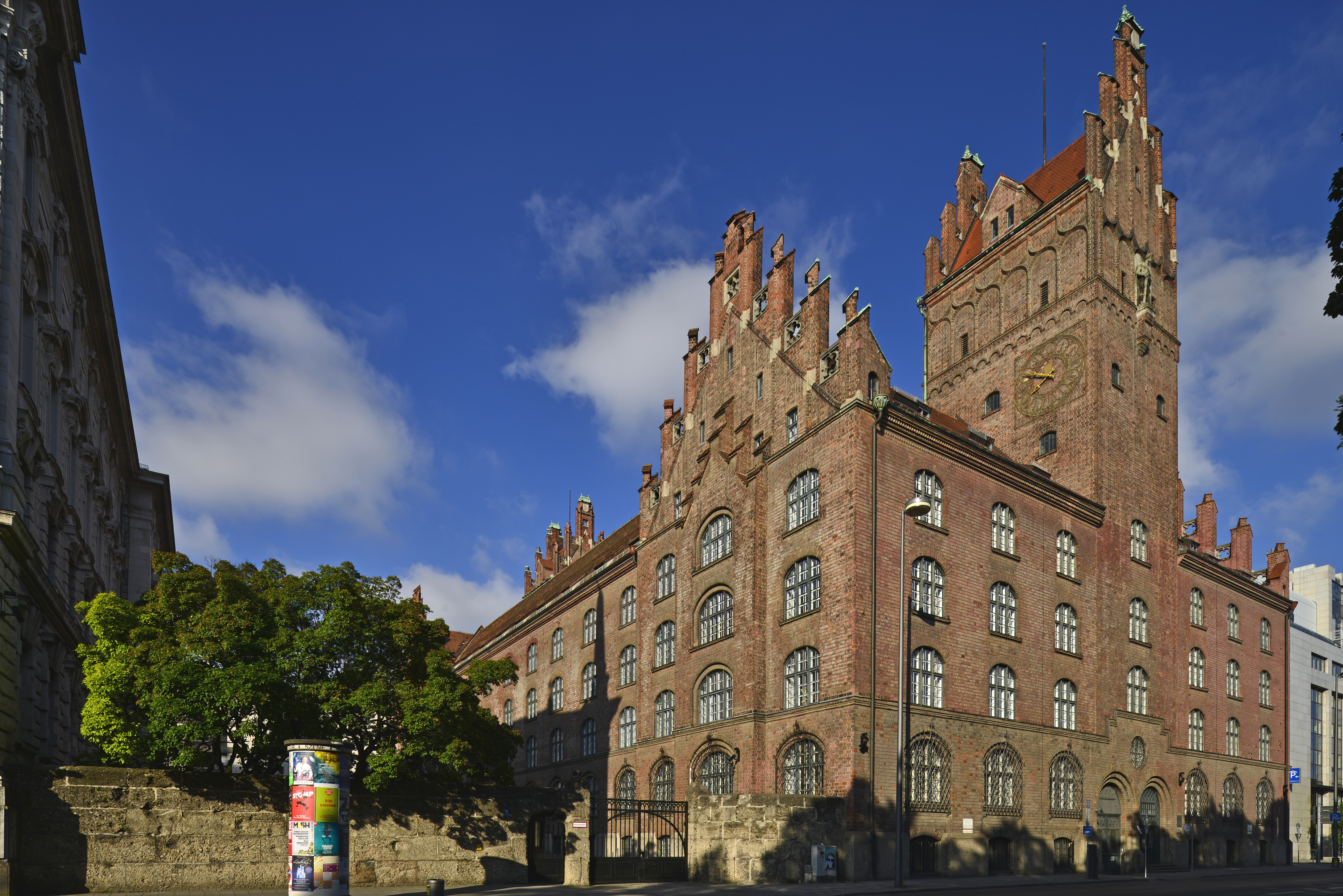 München, Maxvorstadt, Elisenstraße 1b. Fassadenansicht des Neuen Justizgebäudes, Nord-Ost-seite, vom Rand des alten Botanischen Garten aus gesehen.